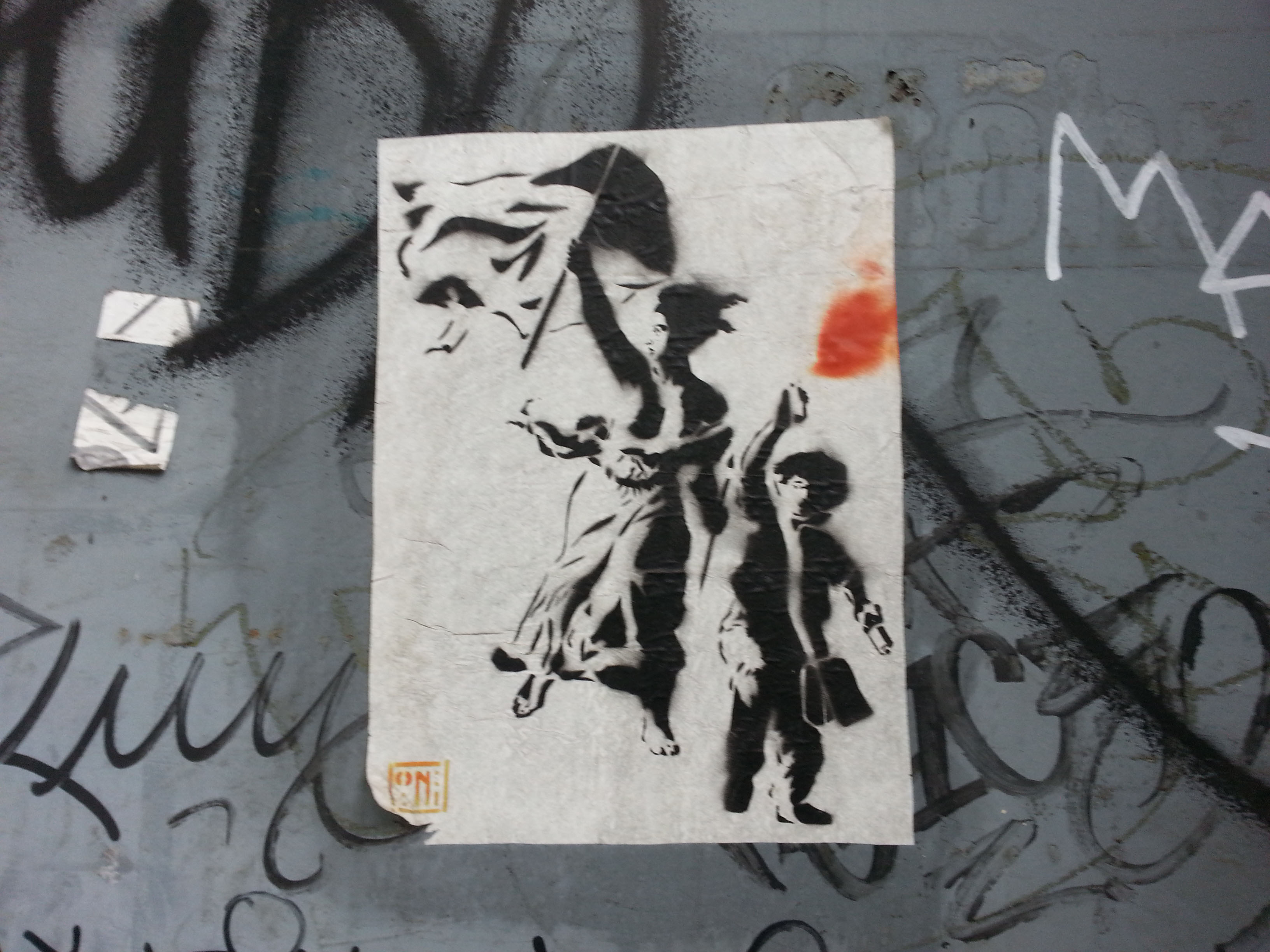 Düsseldorf, September 2015, Hofeingangstor mit Schablonenbild zur Juli Revolution 1830